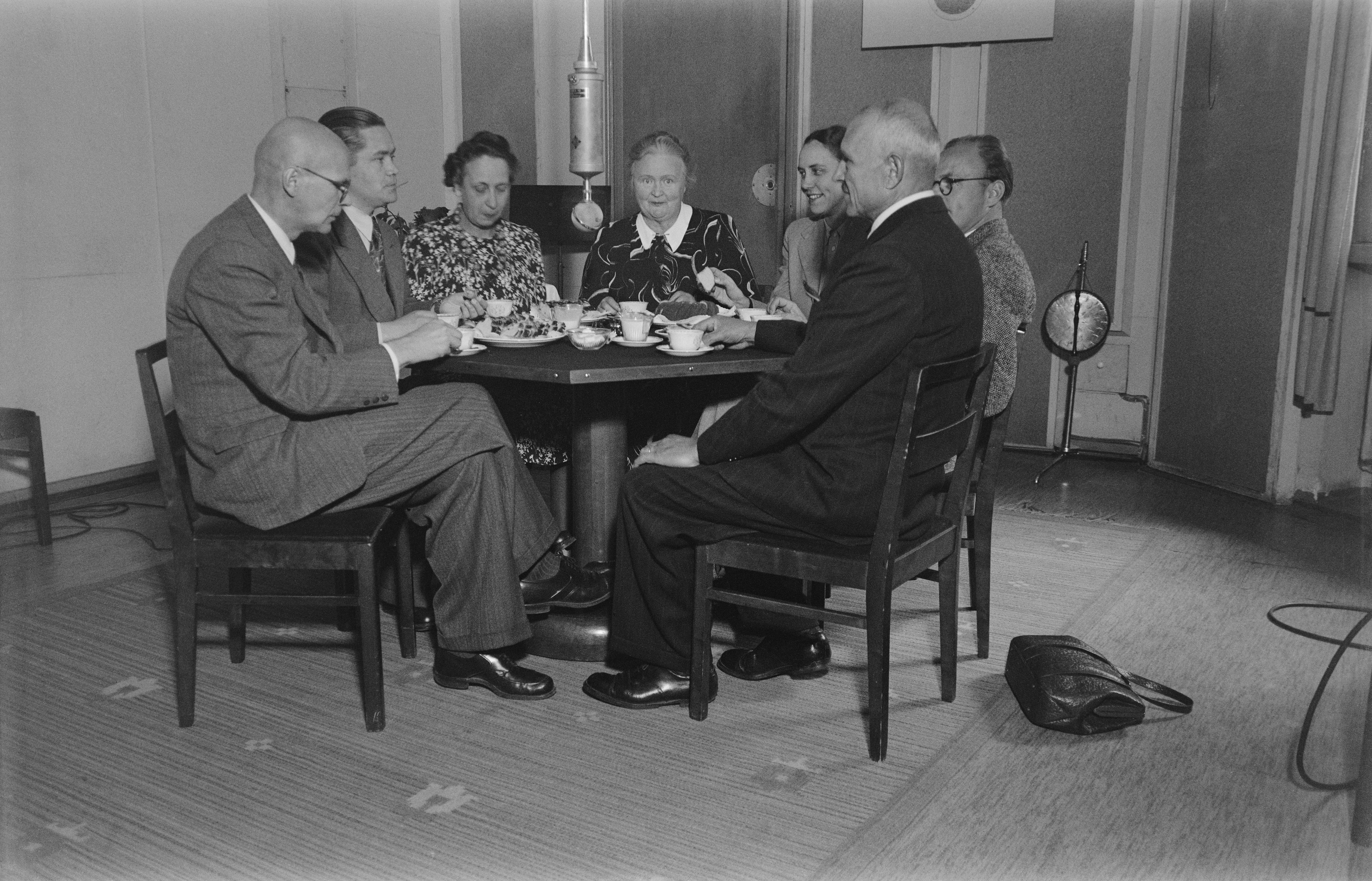 Radio-ohjelma Pienoisparlamentin ensimmäinen istunto. Studiossa ministeri Urho Kekkonen, professori Alvar Wilska, kansanedustaja Sylvi-Kyllikki Kilpi, Yleisradion pääjohtaja Hella Wuolijoki, kansanedustajat Hertta Kuusinen, Nils Meinander ja Lasse Hiekkala (Lassi Hiekkala). Tiedätkö jotain tästä kuvasta? Jätä kommentti tai ota yhteyttä sähköpostitse: Tutustu Ylen arkistosisältöihin: More about Yle, the Finnish Broadcasting Company